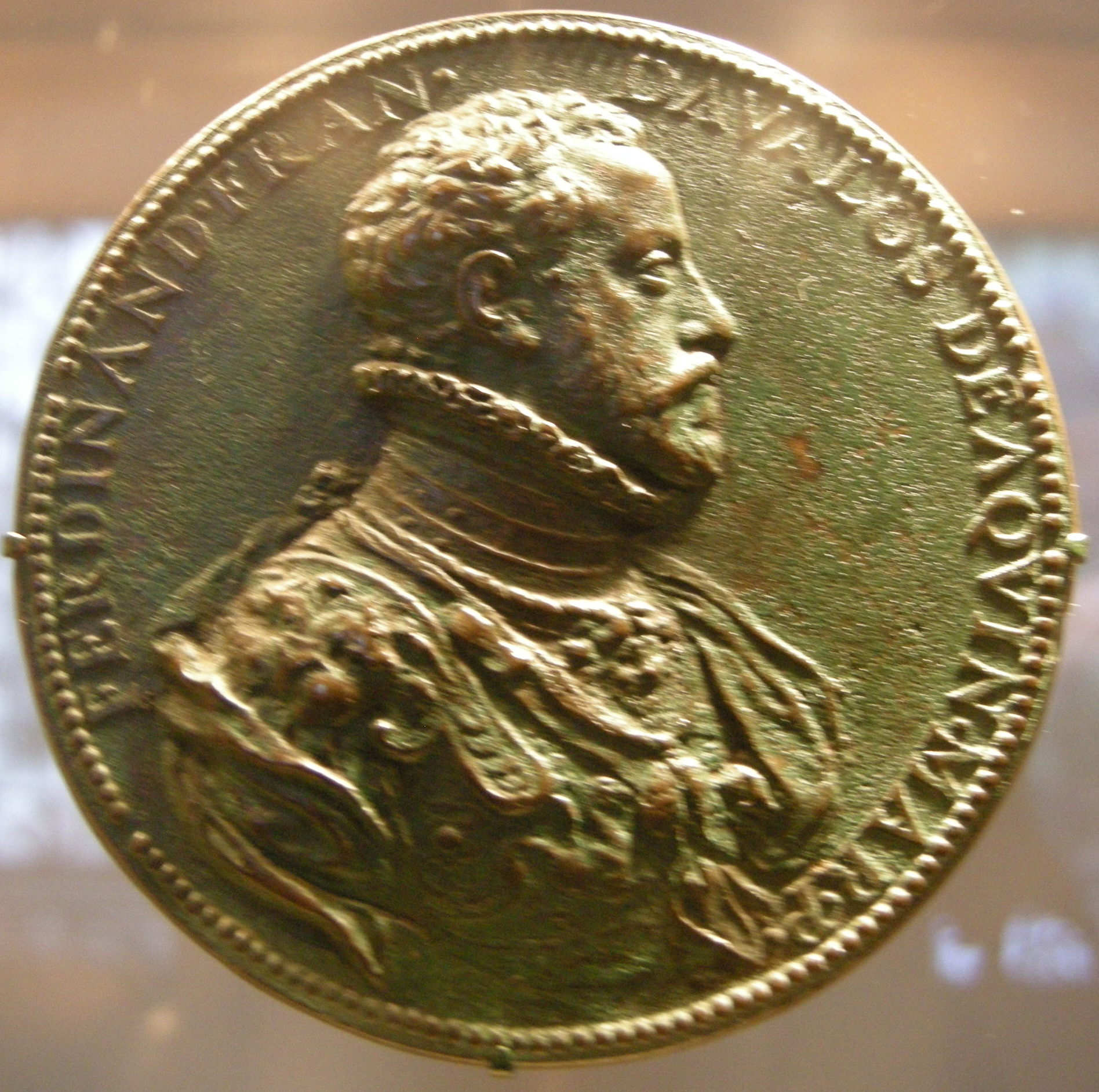 Medaglia per Ferdinando Francesco II d'Avalos, 1562 ca., recto. Esposto nella National Gallery of Art.